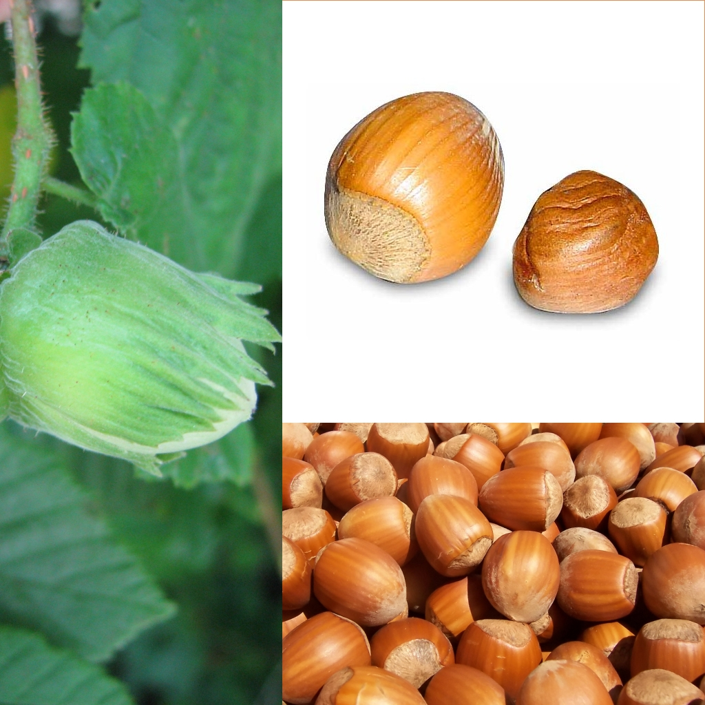 Grafika podręcznika Wikijunior:Owoce. Orzech laskowy, leszczyna pospolita (Corylus avellana).